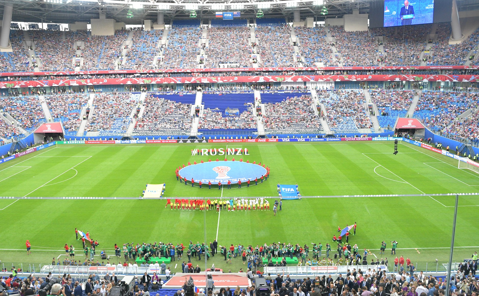 Перед началом первого матча Кубка конфедераций 2017 года